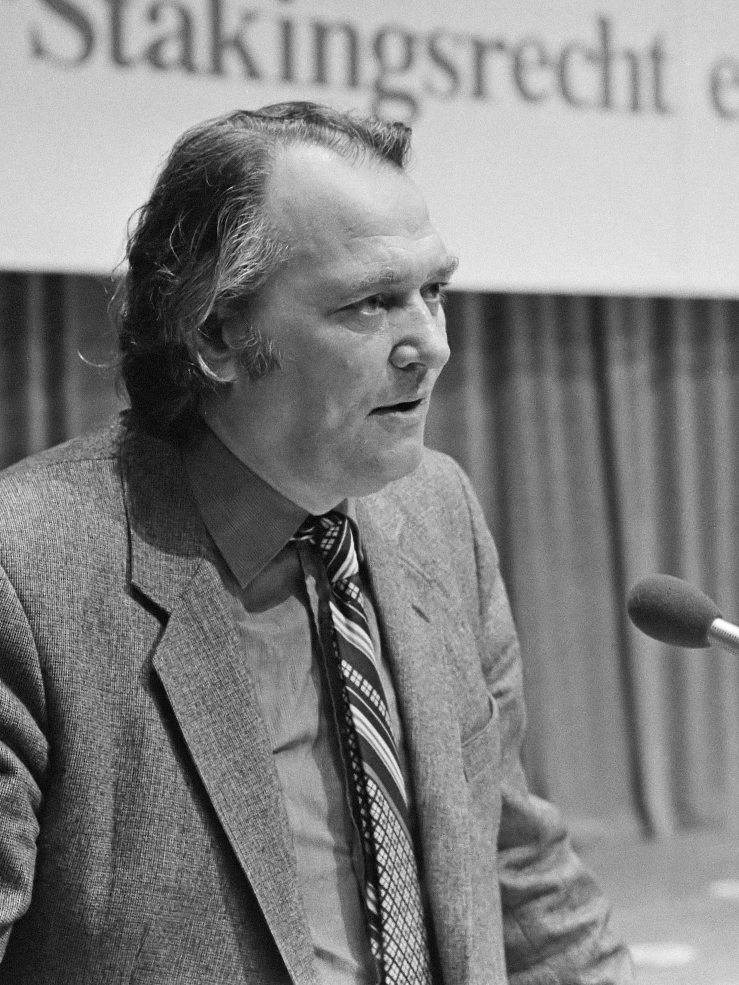 Kaderbijeenkomst Industriebond FNV over stakingsrecht; Herman Bode 29 maart 1980